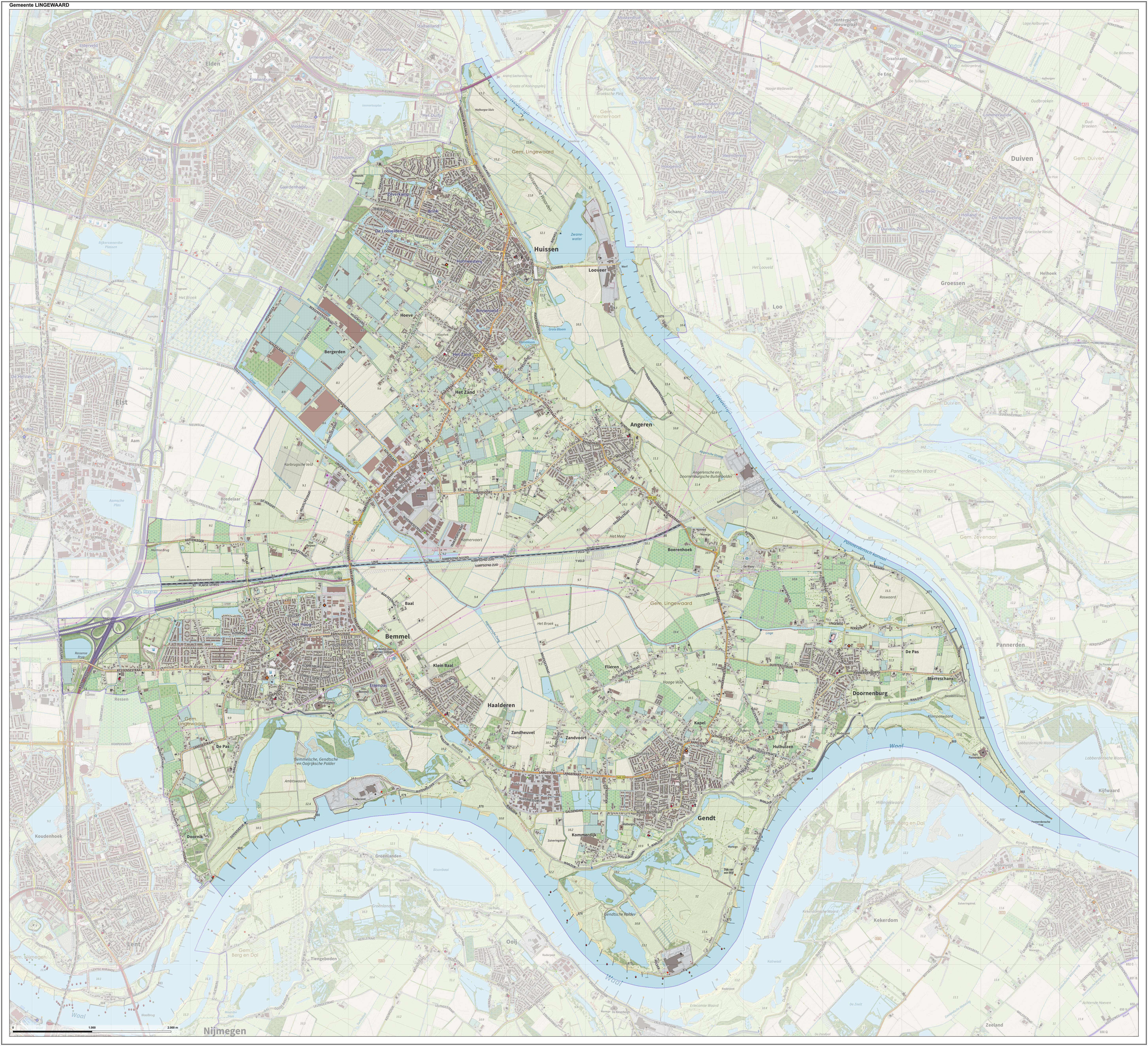 Topografische gemeentekaart. Resolutie: 400 pixels/km. Kaartbeeld samengesteld uit de open geodata van de Top10NL en Top25namen (Kadaster), Creative Commons-BY licentie. Gebouwvlakken uit open geodata BAG extract. Wegen uit de OpenStreetMap, OpenStreetMap community. Reliëfschaduw uit de Actuele Hoogtekaart AHN2. Samenstelling en kleurenschema: Jan-Willem van Aalst, met QGIS. Zie ook de Legenda.